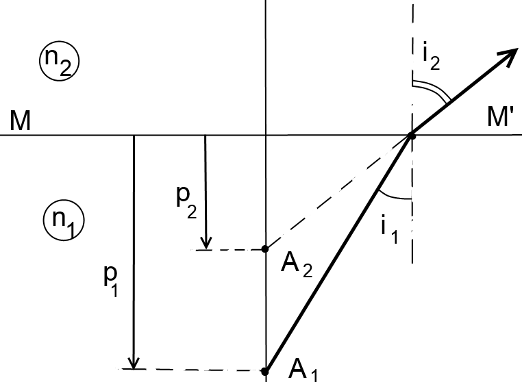 Gauss Approximation